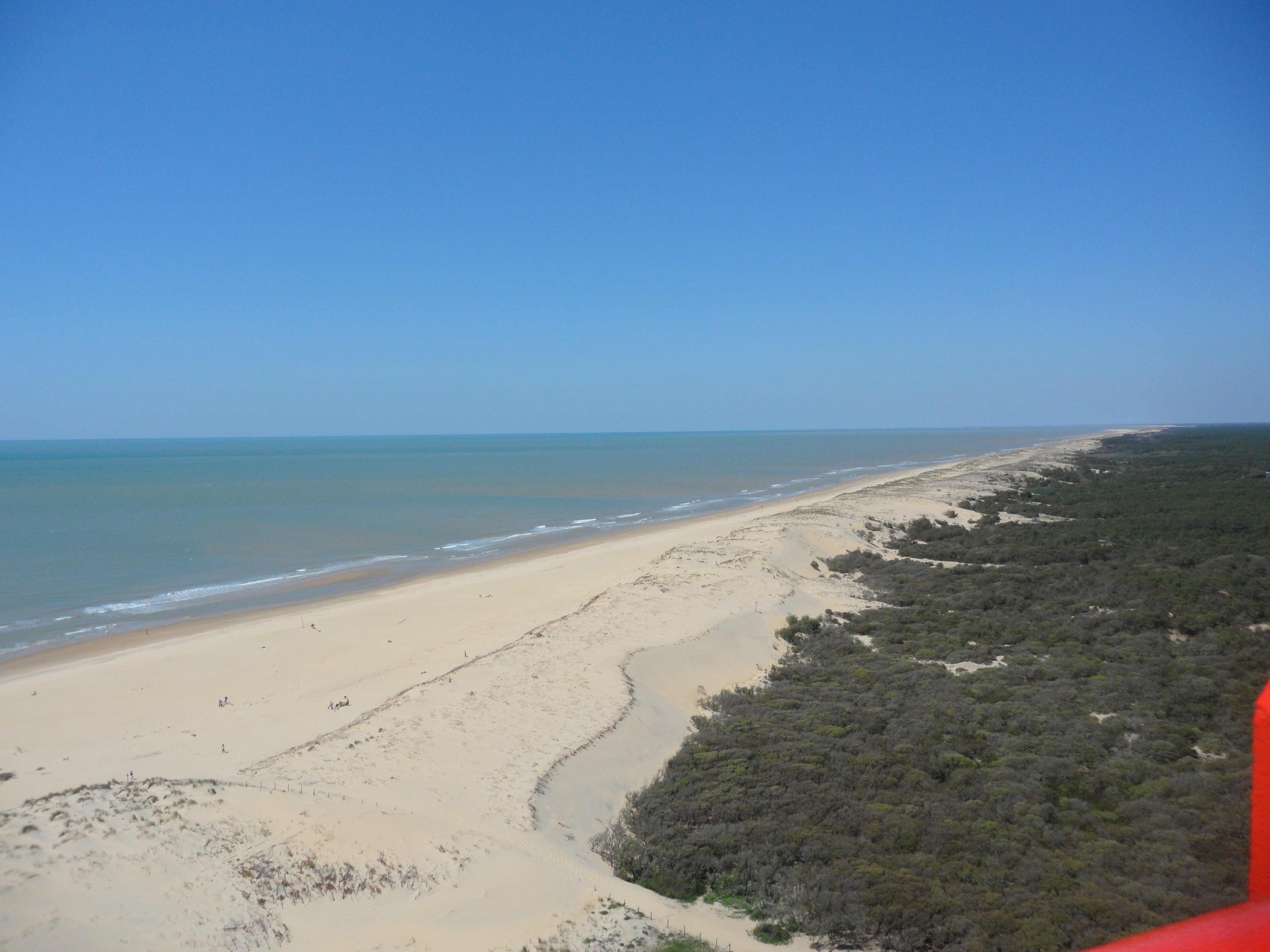 La côte sauvage vue depuis le phare de la Coubre